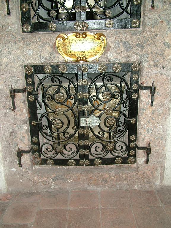 Grab Sigismund Franz